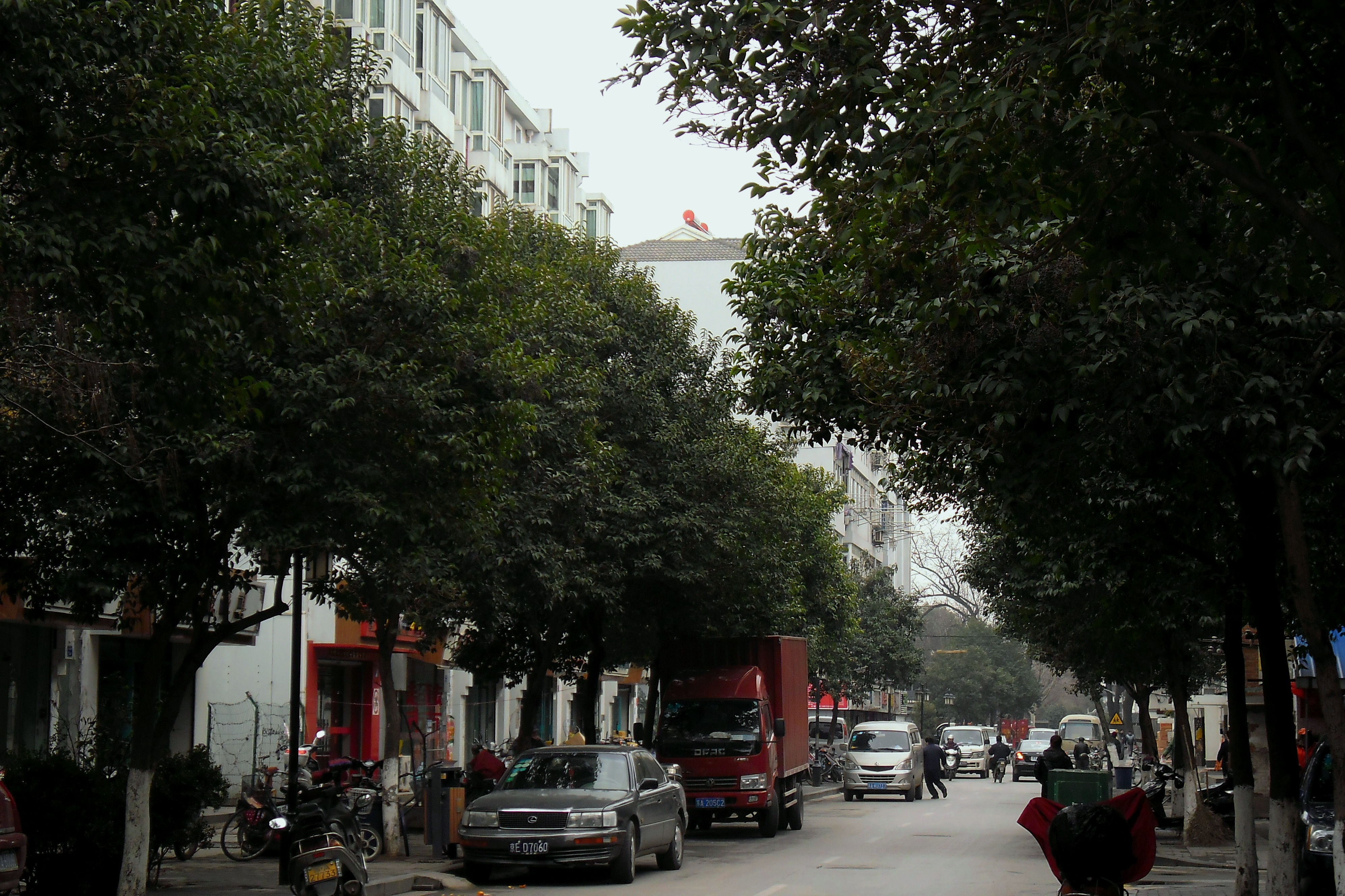 中文（中国大陆）: 江苏省南京市